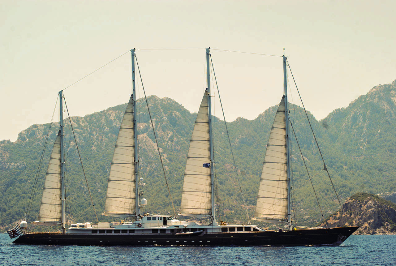 Le Phocéa en Méditerranée à Marmaris.